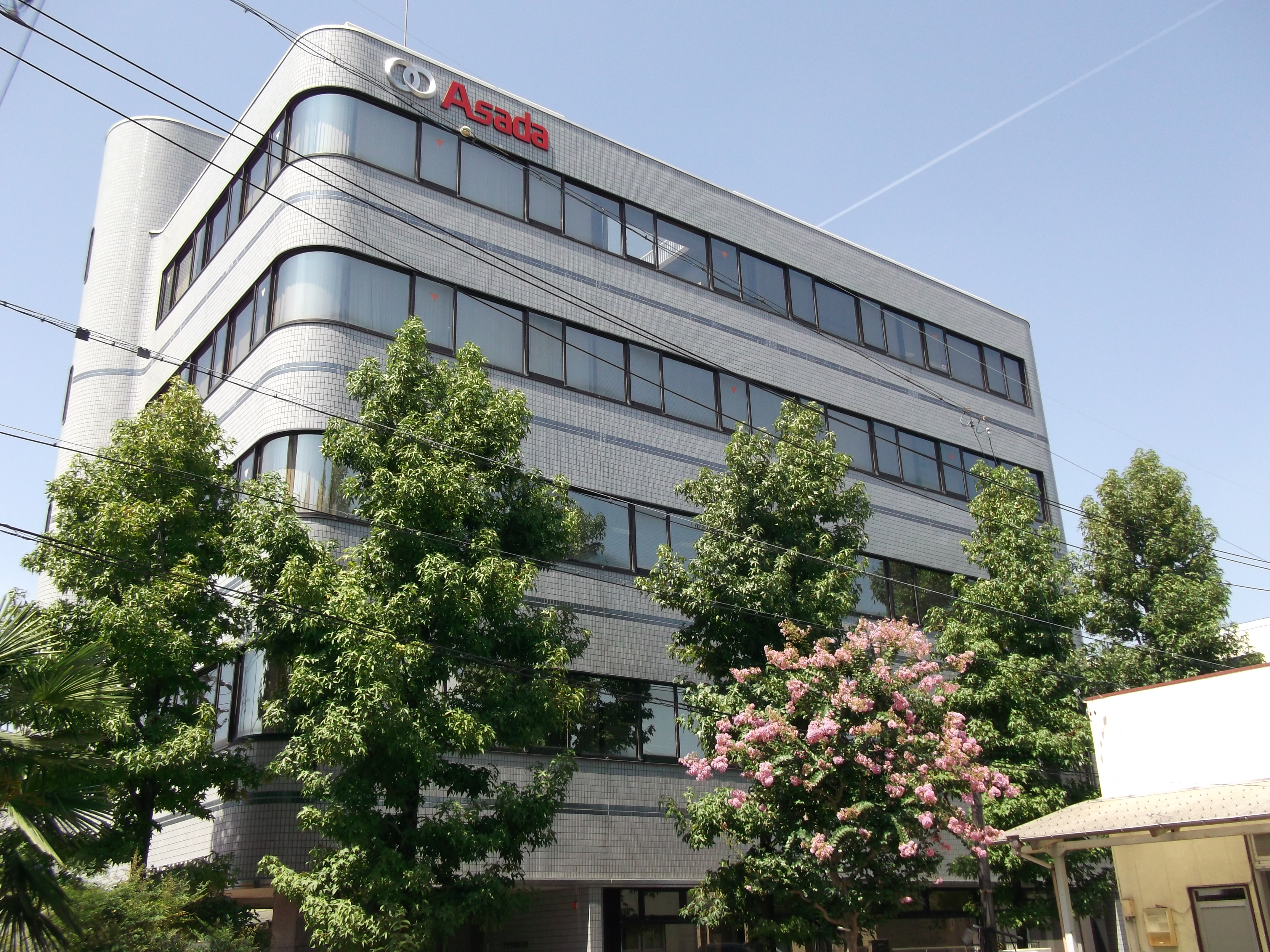 名古屋市北区上飯田西町のアサダ本社を南側公道東側より撮影